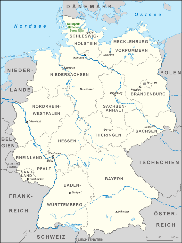 Karte des Naturparks Hüttener Berge in Deutschland